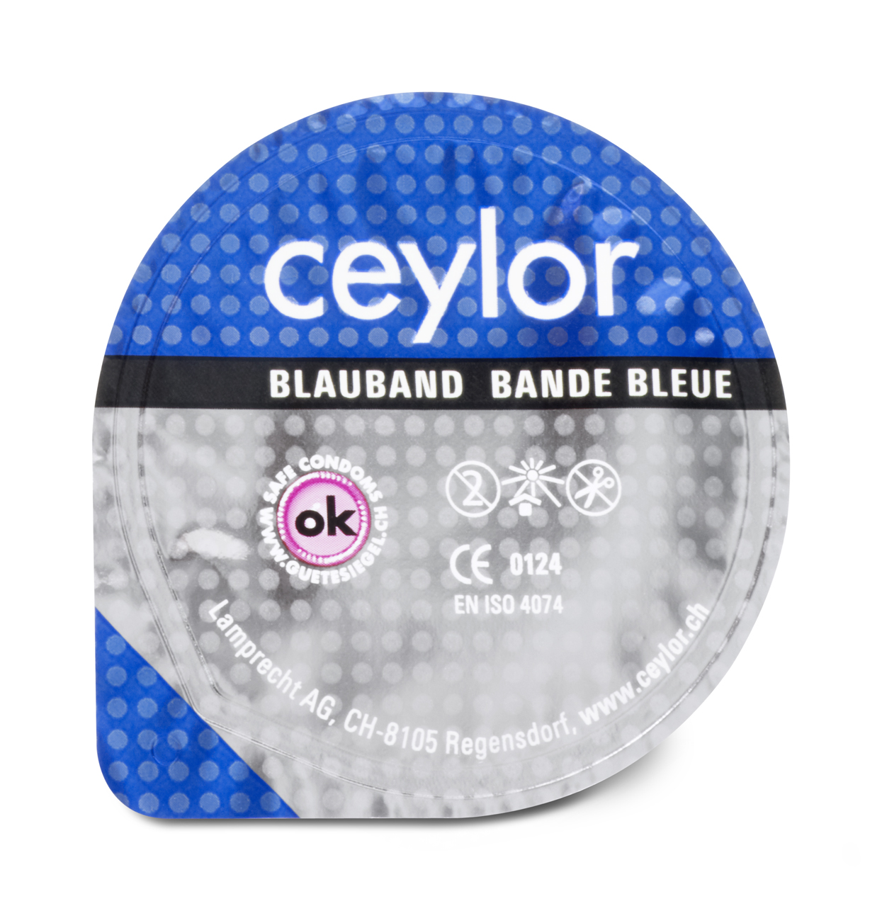 Ceylor Kondom-Dösli Blauband